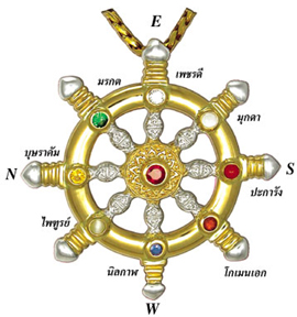 เก้ารัตนพิสุทธิ์ประดับตามตำแหน่งยันต์นพเคราะห์